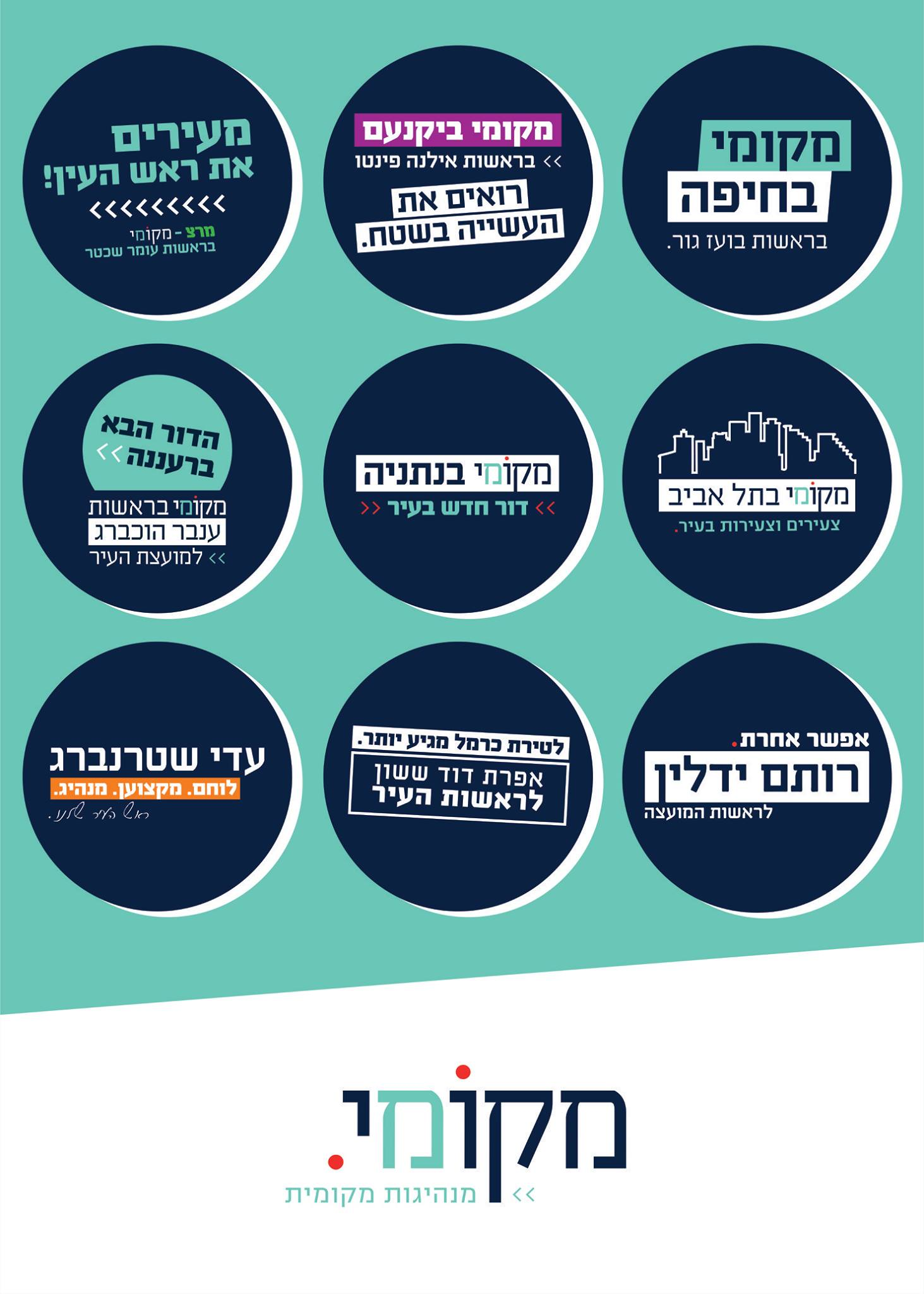 הקמפיינים בהם מנהיגות מקומית הייתה שותפה